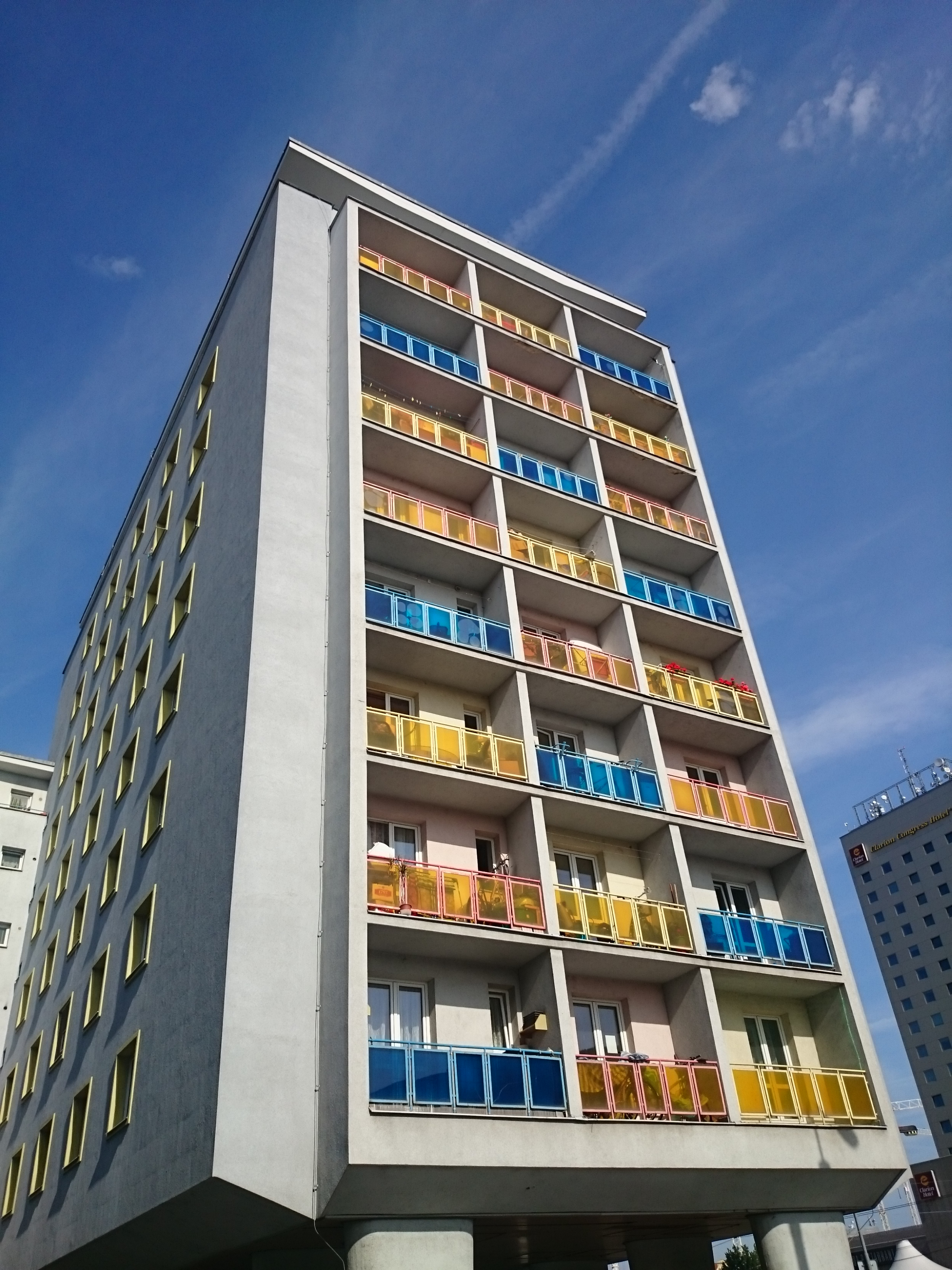 Kulturdenkmal an der Prážská třída.